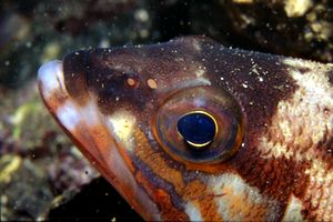 Serranus cabrilla